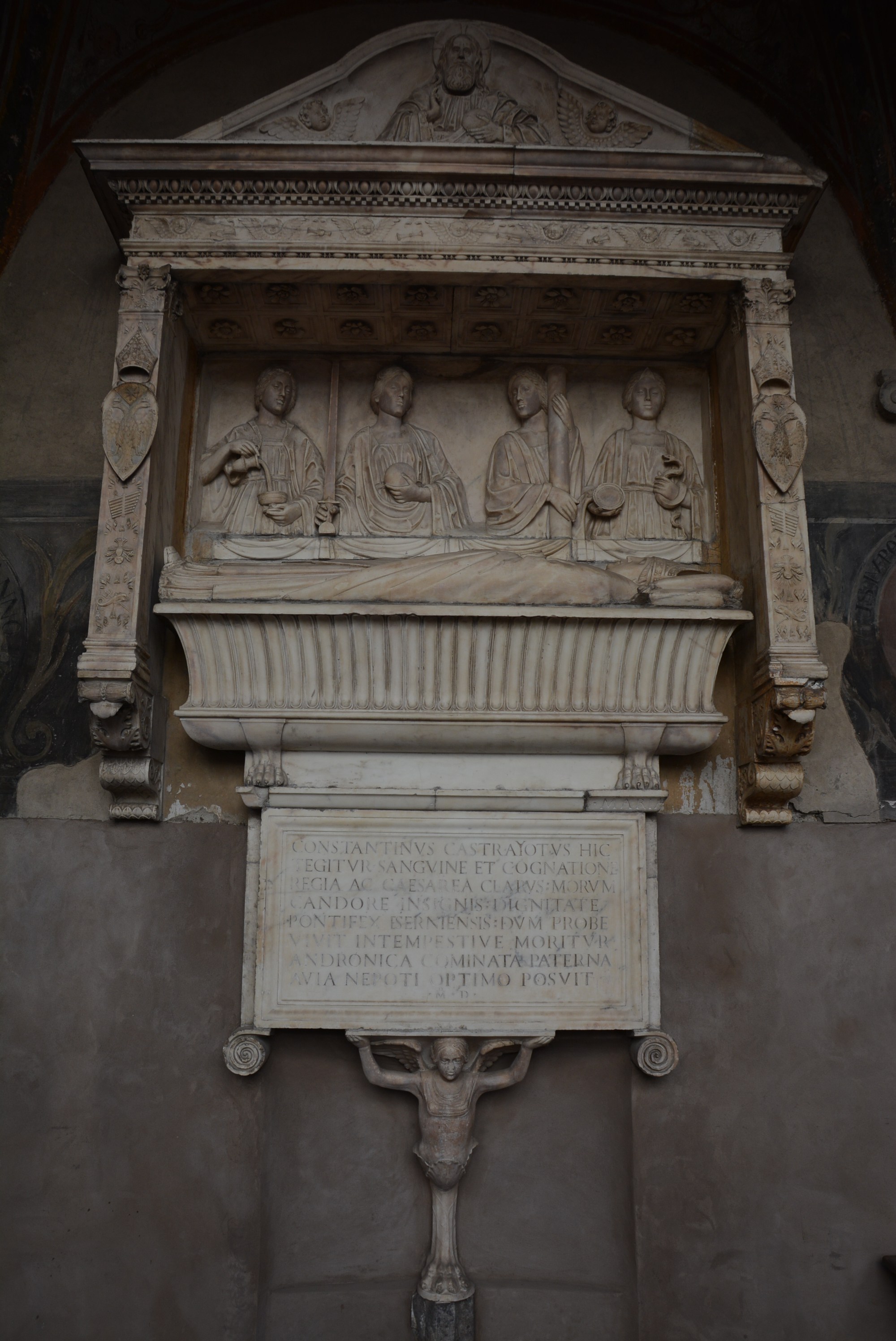 Chiostro piccolo della chiesa di Santa Maria la Nova a Napoli